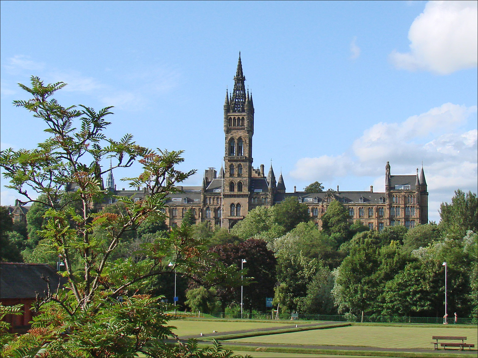 L'université de Glasgow a été fondée en 1451. Elle a été transférée sur la colline Gilmorehill au 19e siècle. Sur la photo, le Kelvingrove Park et le bâtiment principal de l'université de style néogothique conçu par l'architecte Sir George Gilbert Scott et par son fils John Oldrid Scott qui a rajouté la flèche.